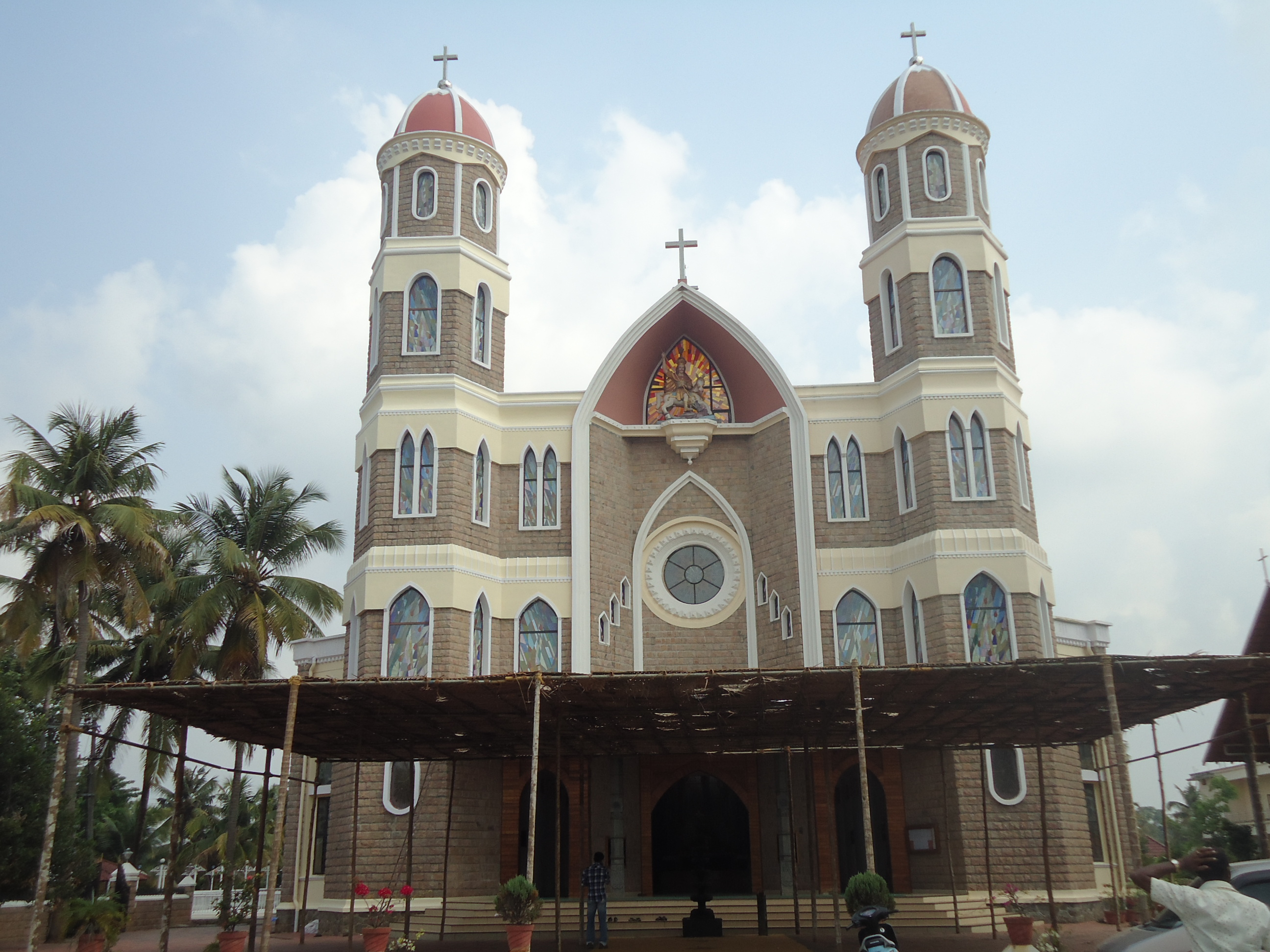 St george Basilica church Angamaly